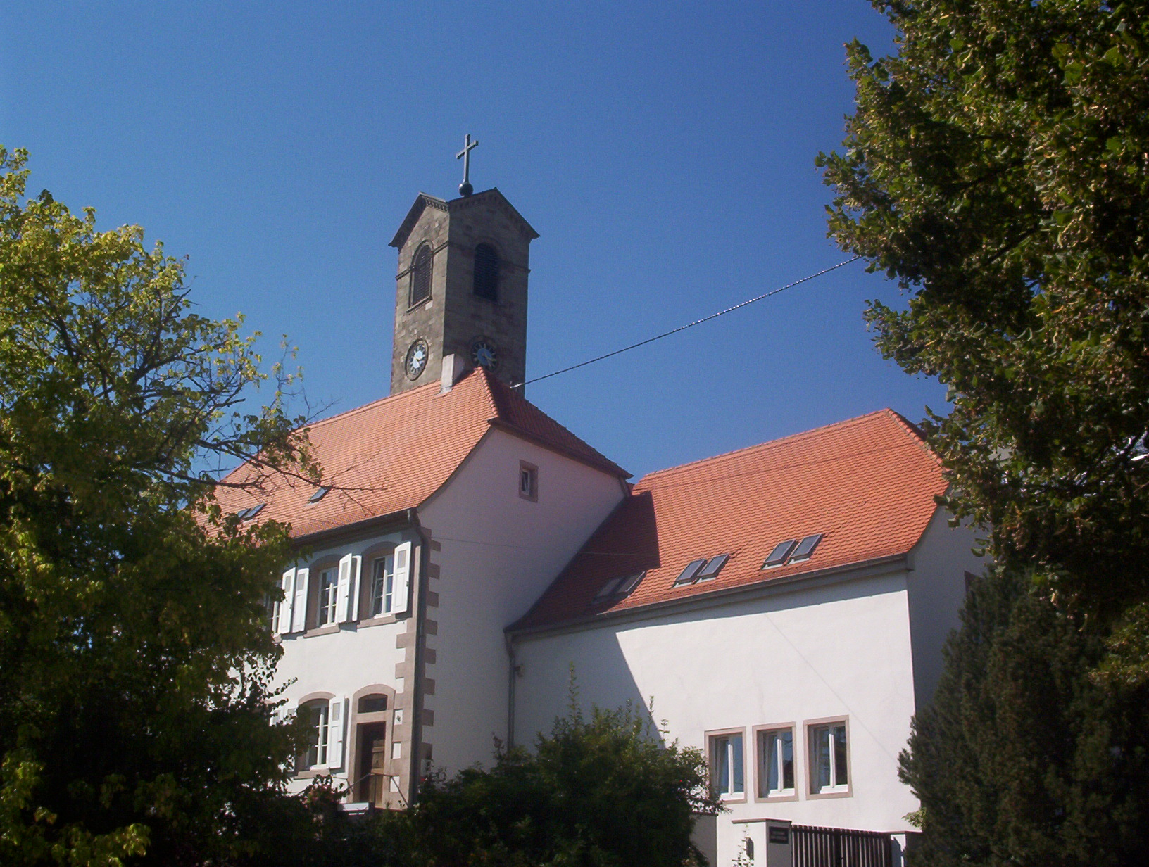 Das Pfarrhaus in Ommersheim im Hintergrund der Kirchturm